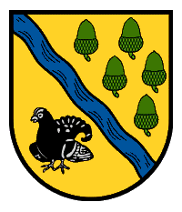 Coat of arms Stemmen (Landkreis Rotenburg), Wappen der Gemeinde Stemmen